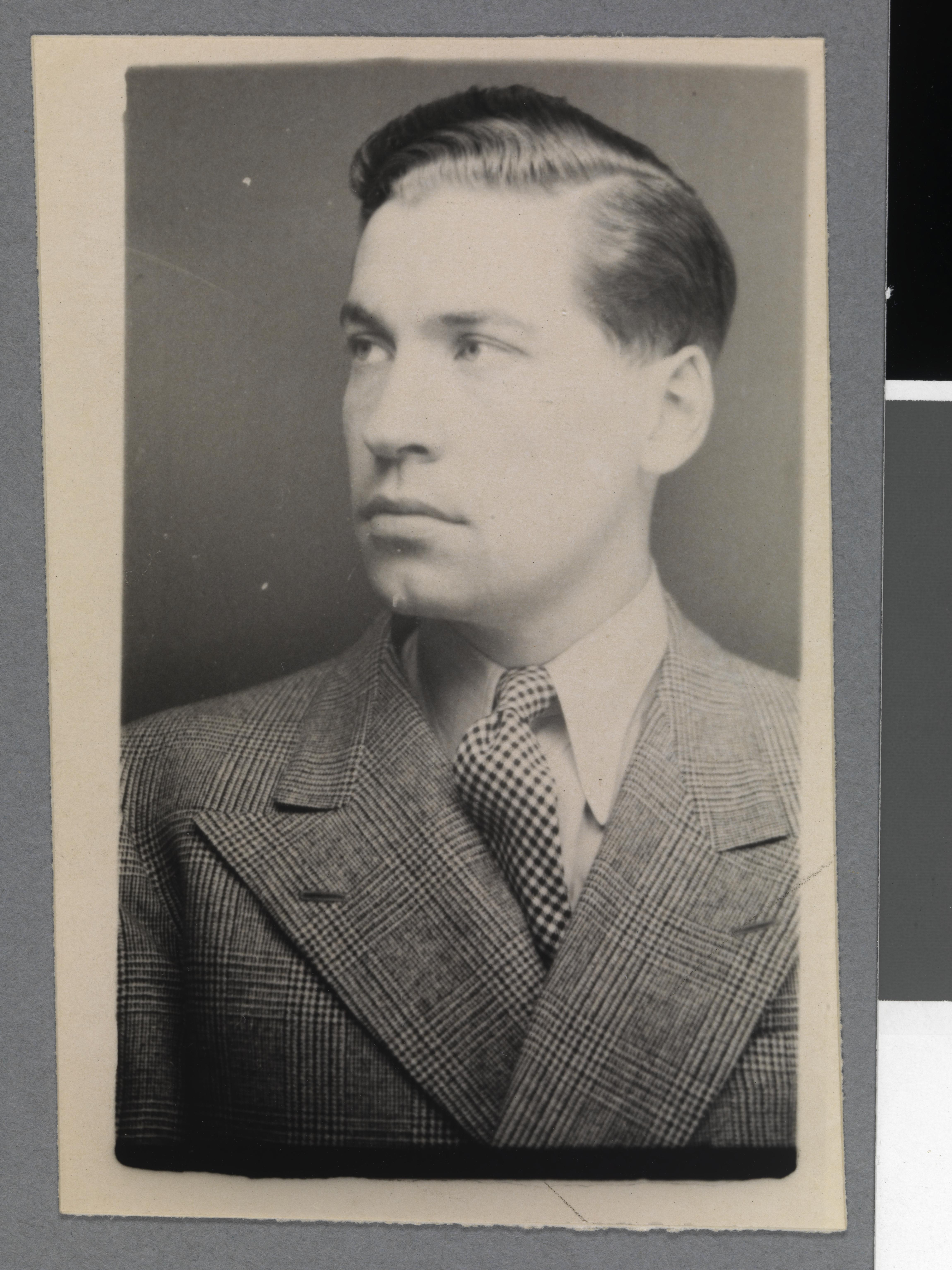 Bildet er hentet fra Nasjonalbibliotekets bildesamling Depicted person: Hamsun, Tore